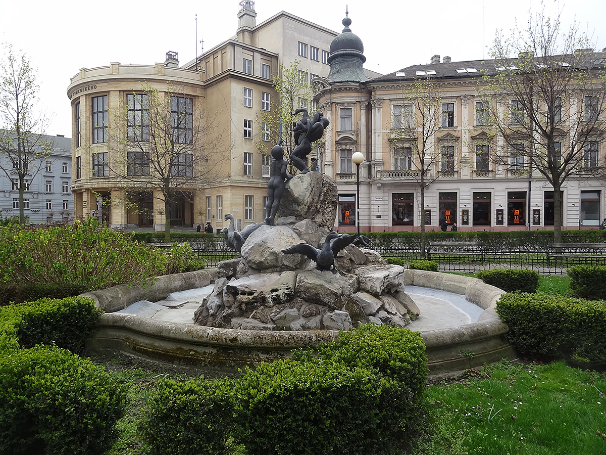 Мальчики ловящие гусей